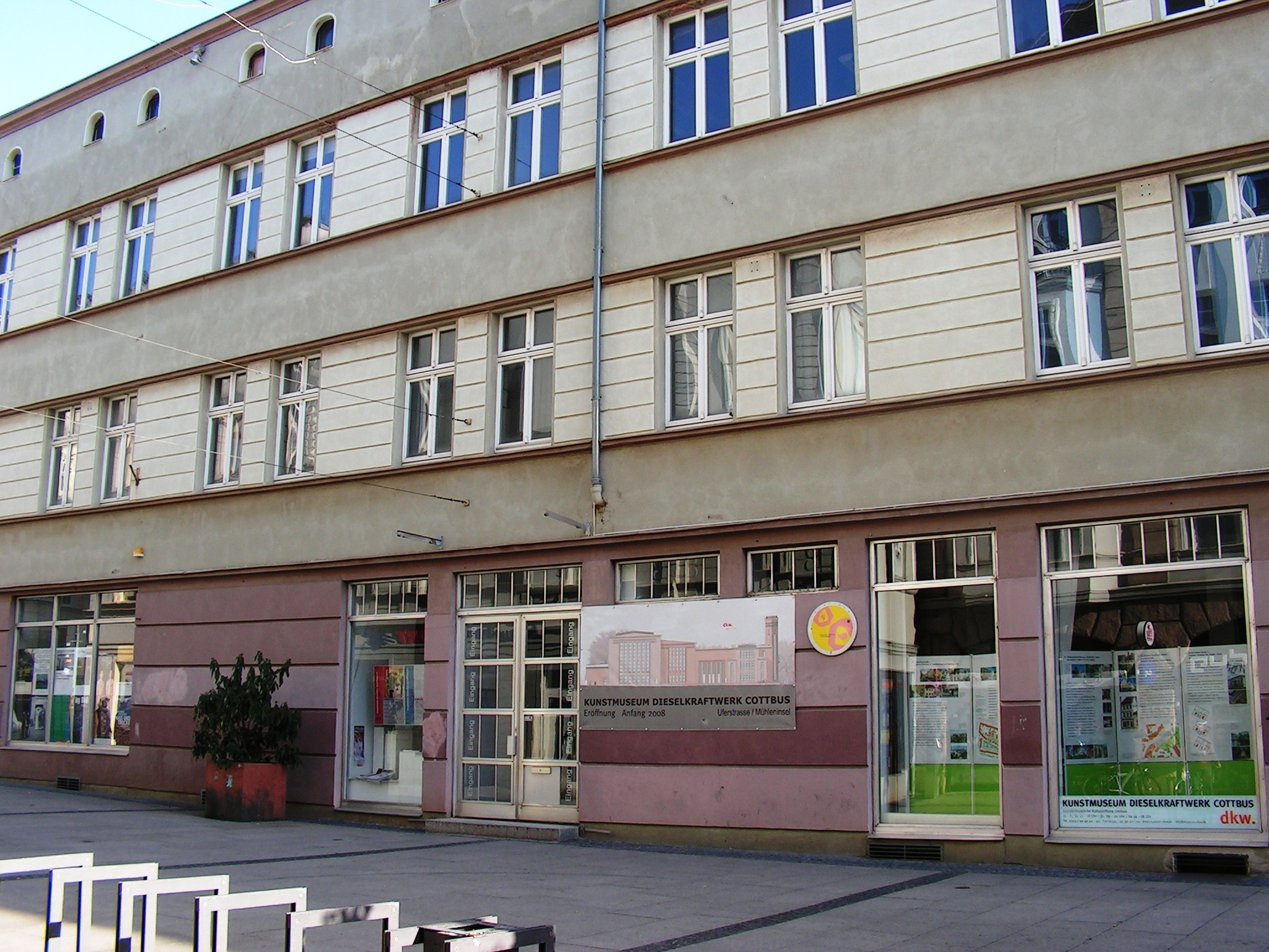 Alter Standort Spremberger Straße.